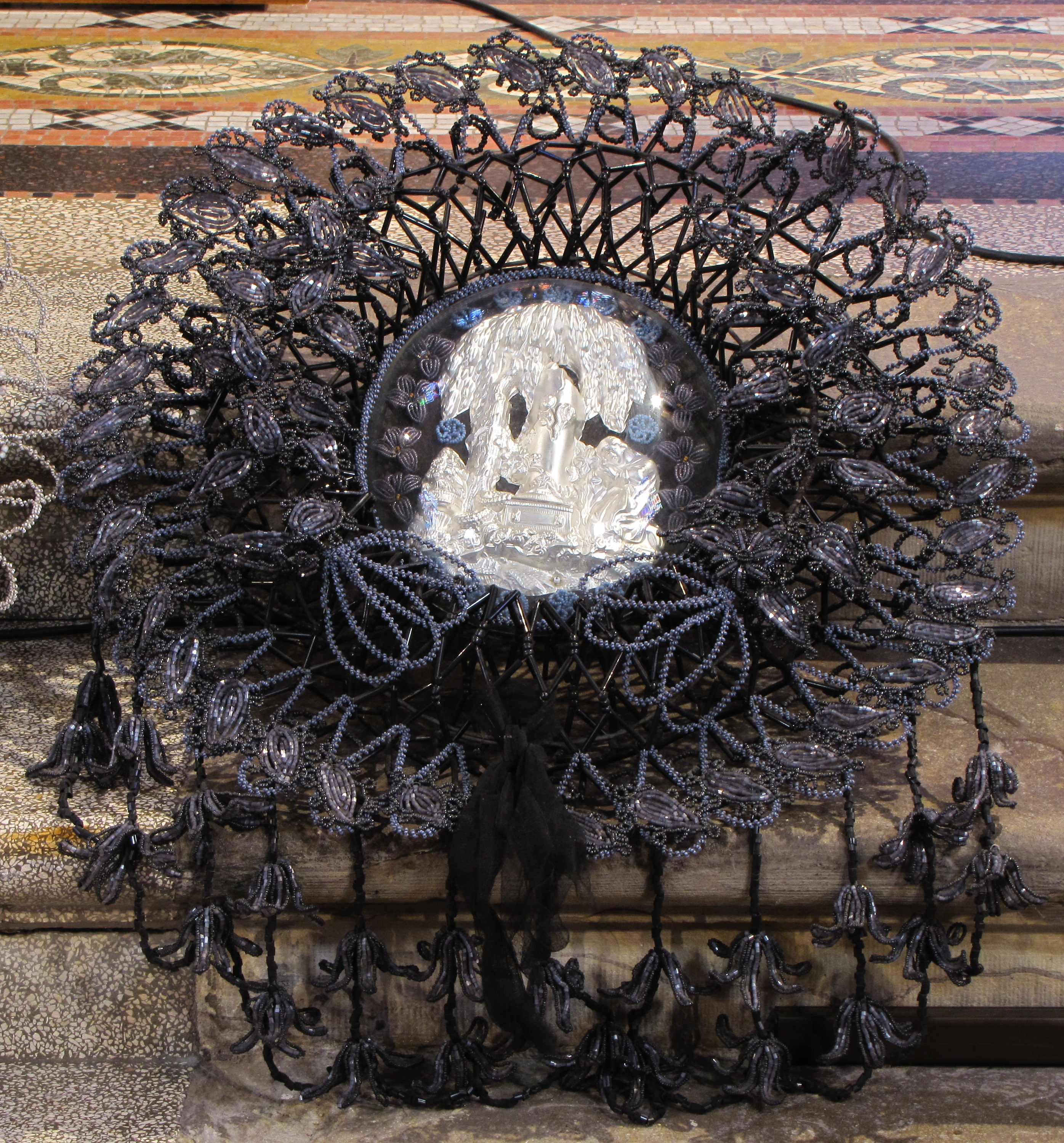 Alsace, Bas-Rhin, Still, Église Saint-Mathias (PA00085010, IA67011366). Couronnes mortuaires en perles (XXe)